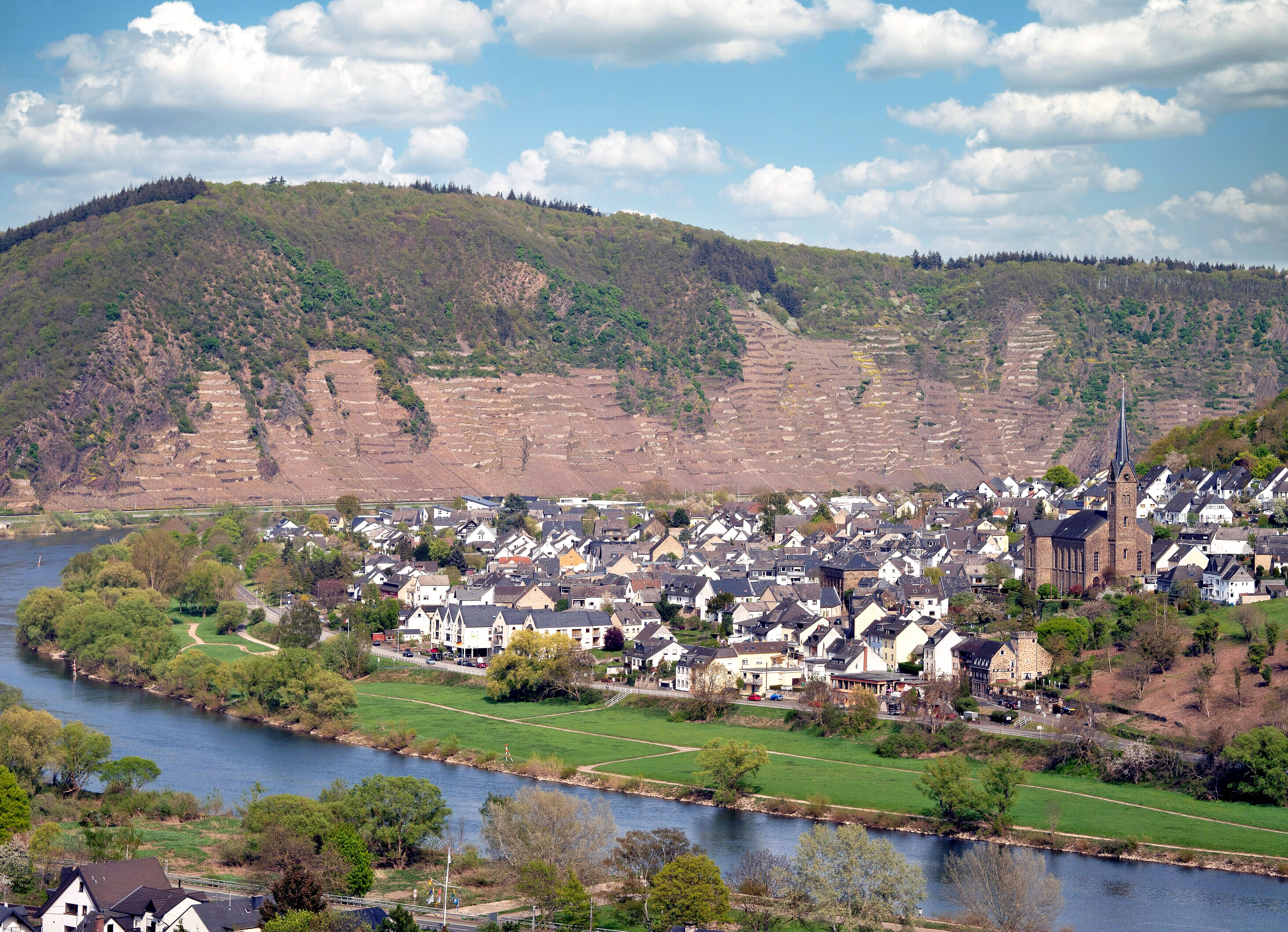 Dieblich an der Mosel, im Hintergrund die Weinbergslage Uhlen